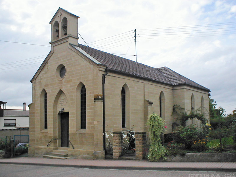 Kath. Kapelle Mariä Schmerzen in Eppingen-Mühlbach